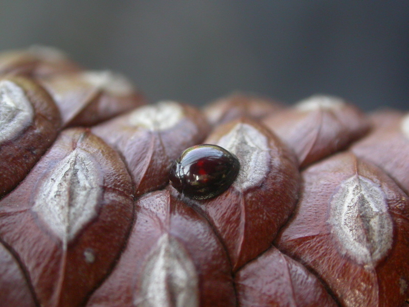 From Madeira